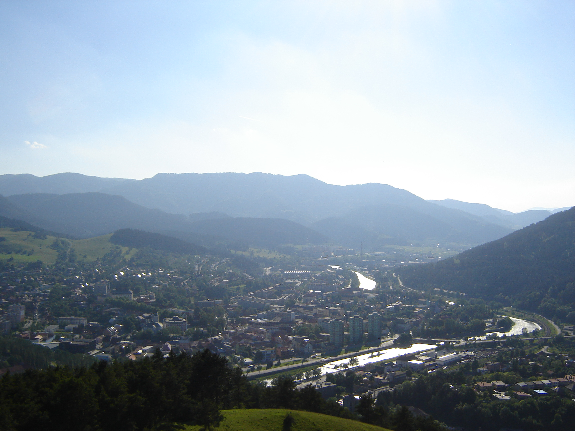 Severozápad Ružomberka